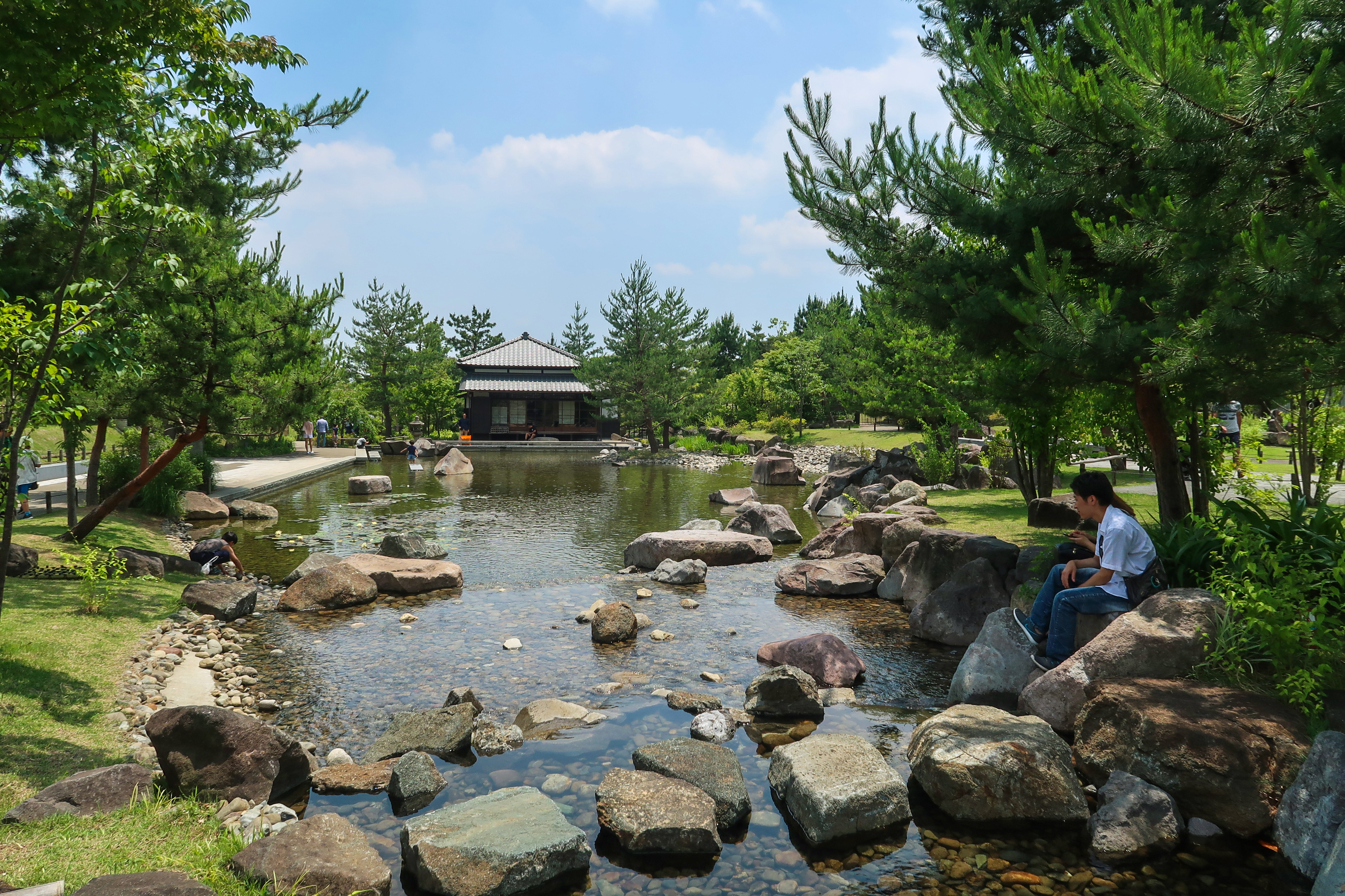 Futako-Tamagawa Park Kishin-en pond